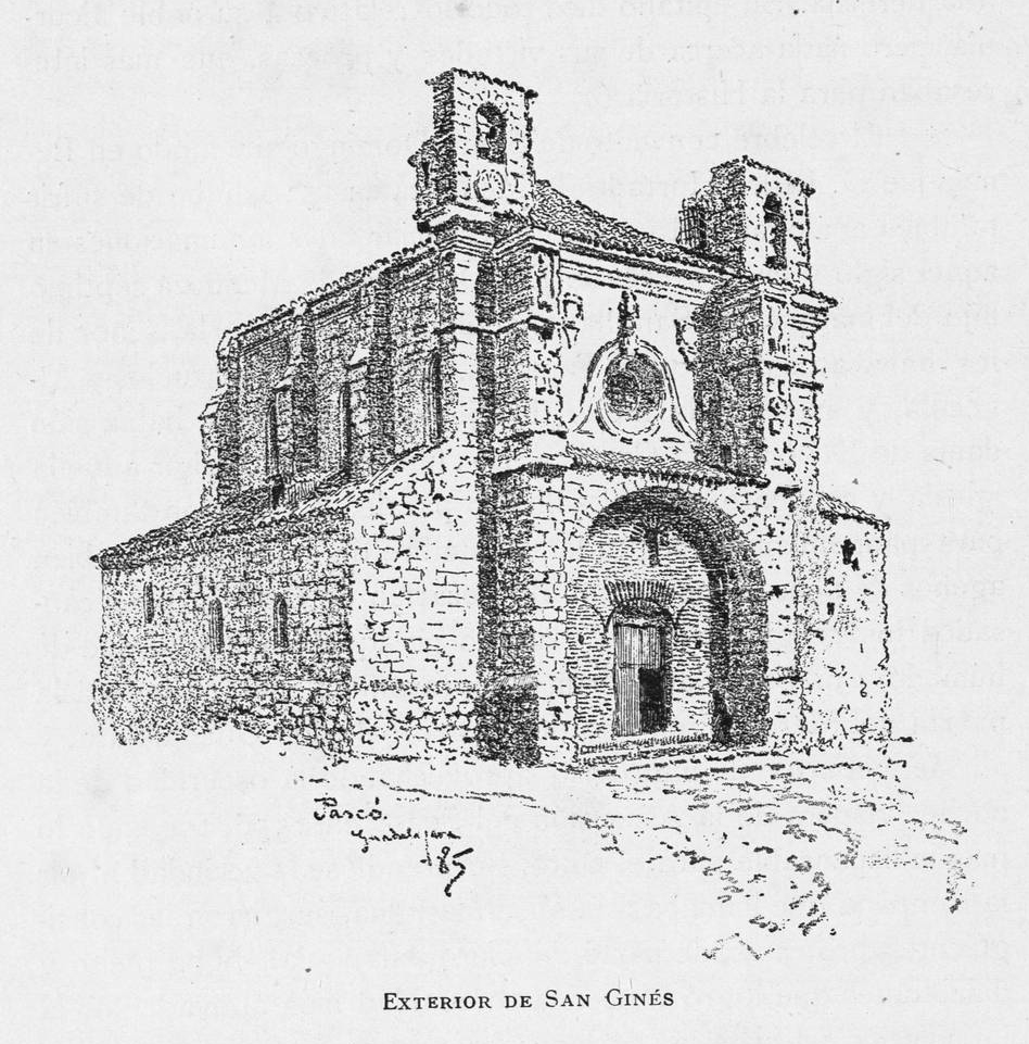 Exterior de San Ginés.